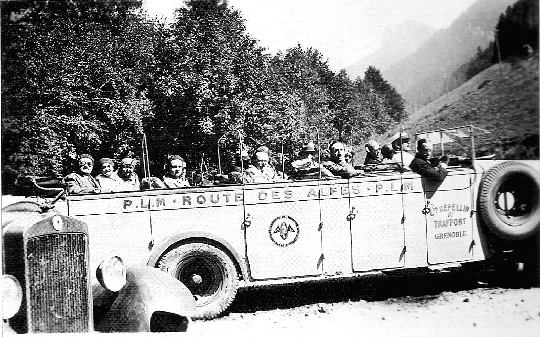 Autocar de touristes dans les Alpes françaises.